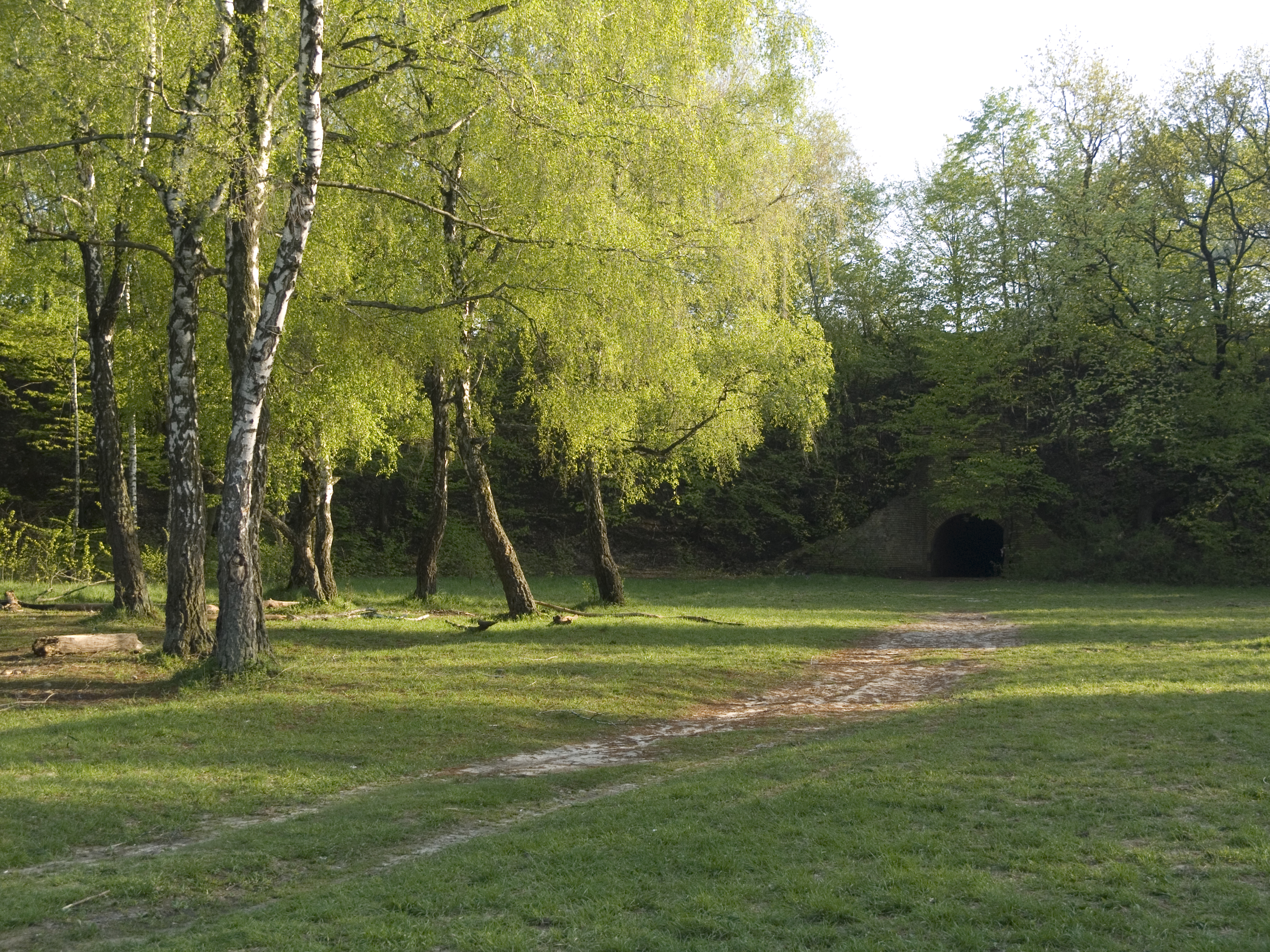 Киев, Лысая гора. Потерна №5